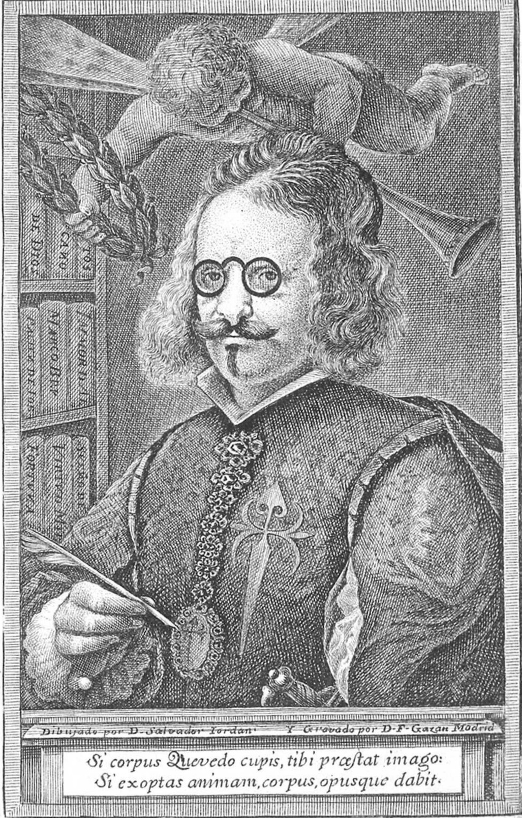 Retrato de Francisco de Quevedo (1580-1645), aguafuerte, dibujo de Salvador Jordán grabado por Francisco Gazán, Biblioteca Nacional de España